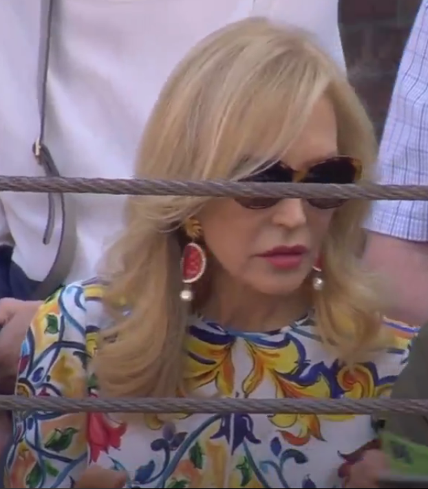 Carmen Lomana à Madrid le 31 mai 2017, assistant depuis le premier rang à la vingt-et-unième corrida de la feria de San Isidro au cours de laquelle Miguel Àngel Perera, Alberto López Simón et Andrés Roca Rey estoquent des taureaux de l'élevage de Victoriano del Río.